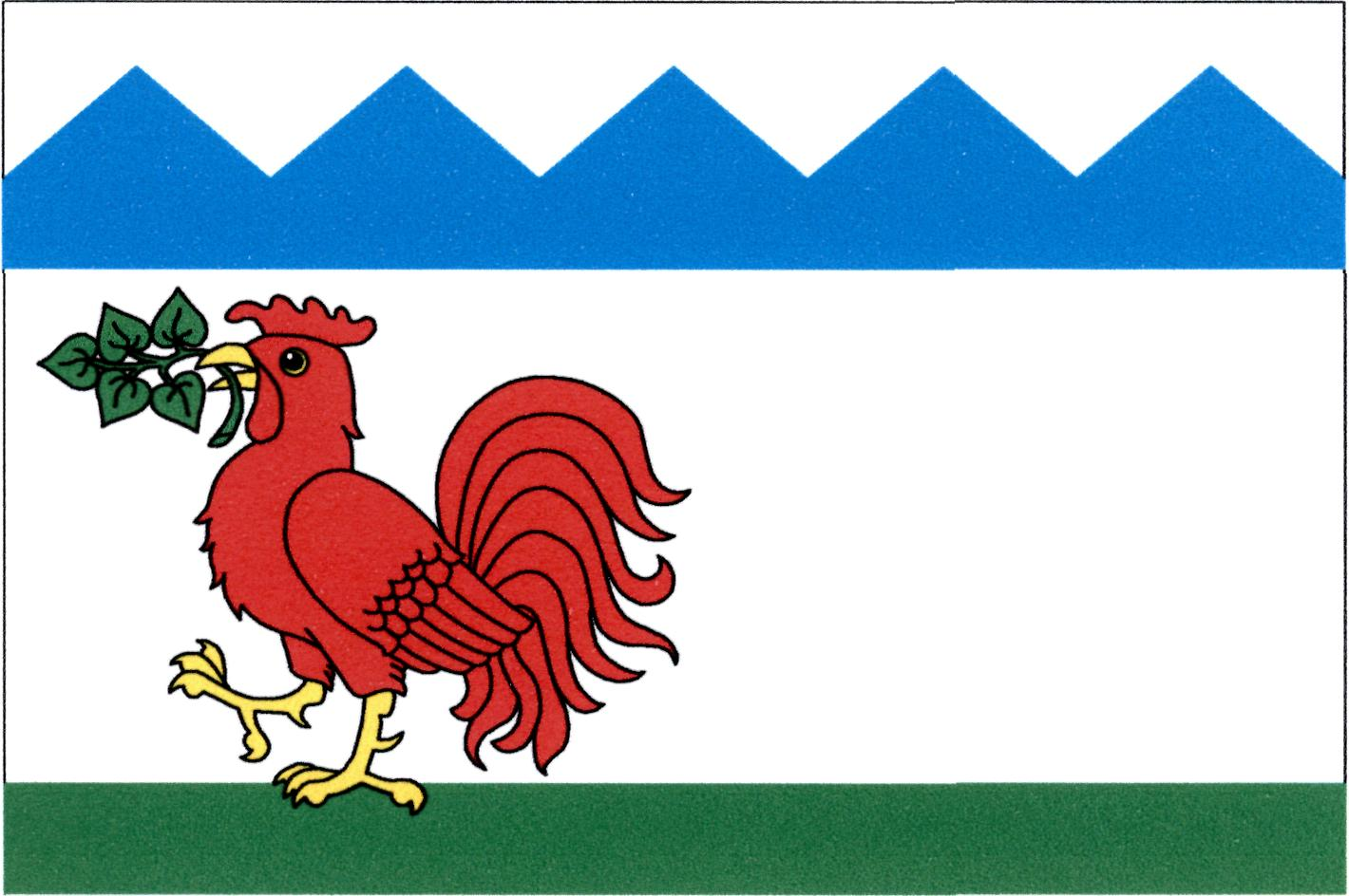 Vlajka obce Střezimíř